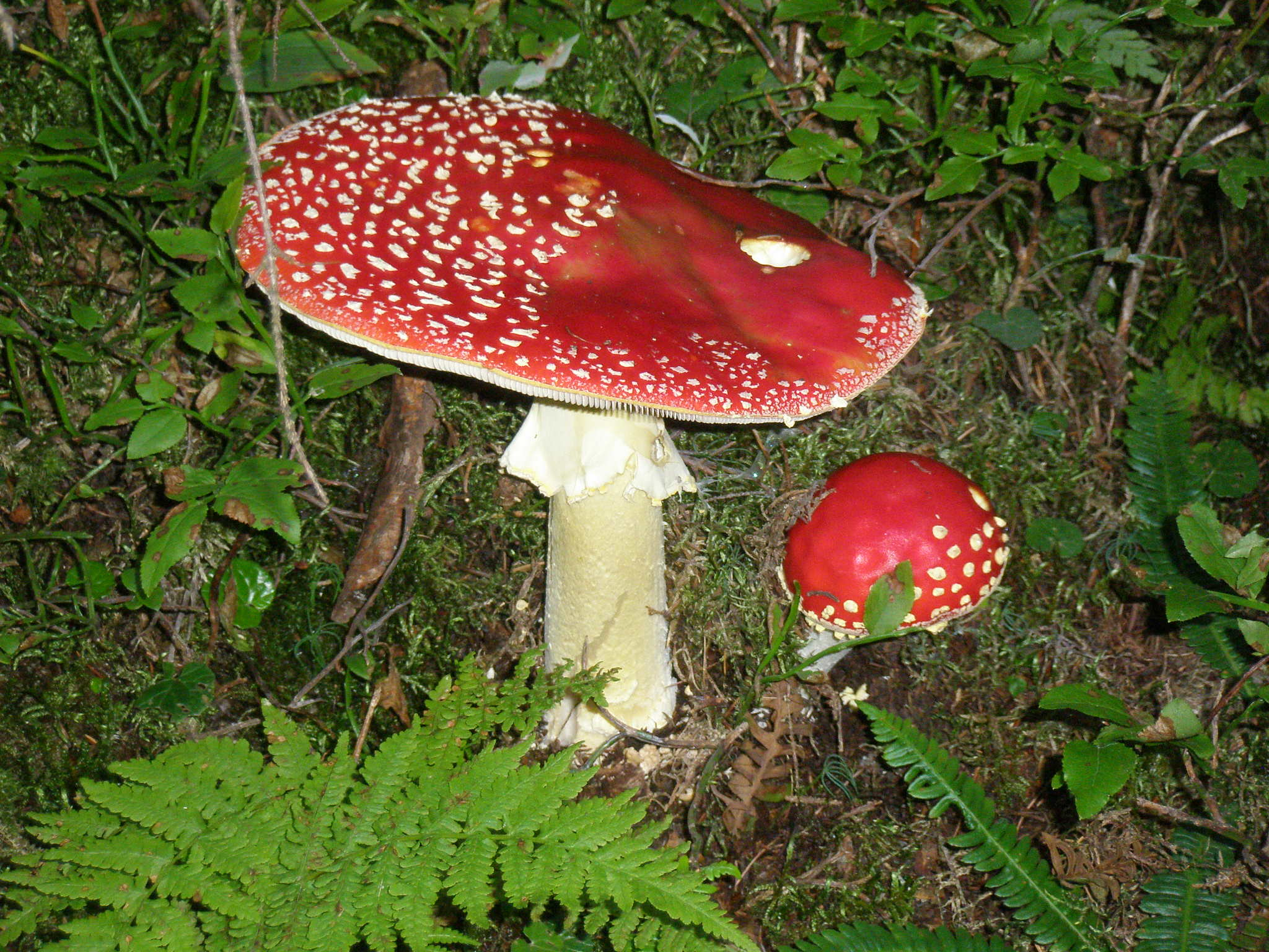 2 Fliegenpilze, fotografiert in Großarl/Salzburg/Österreich